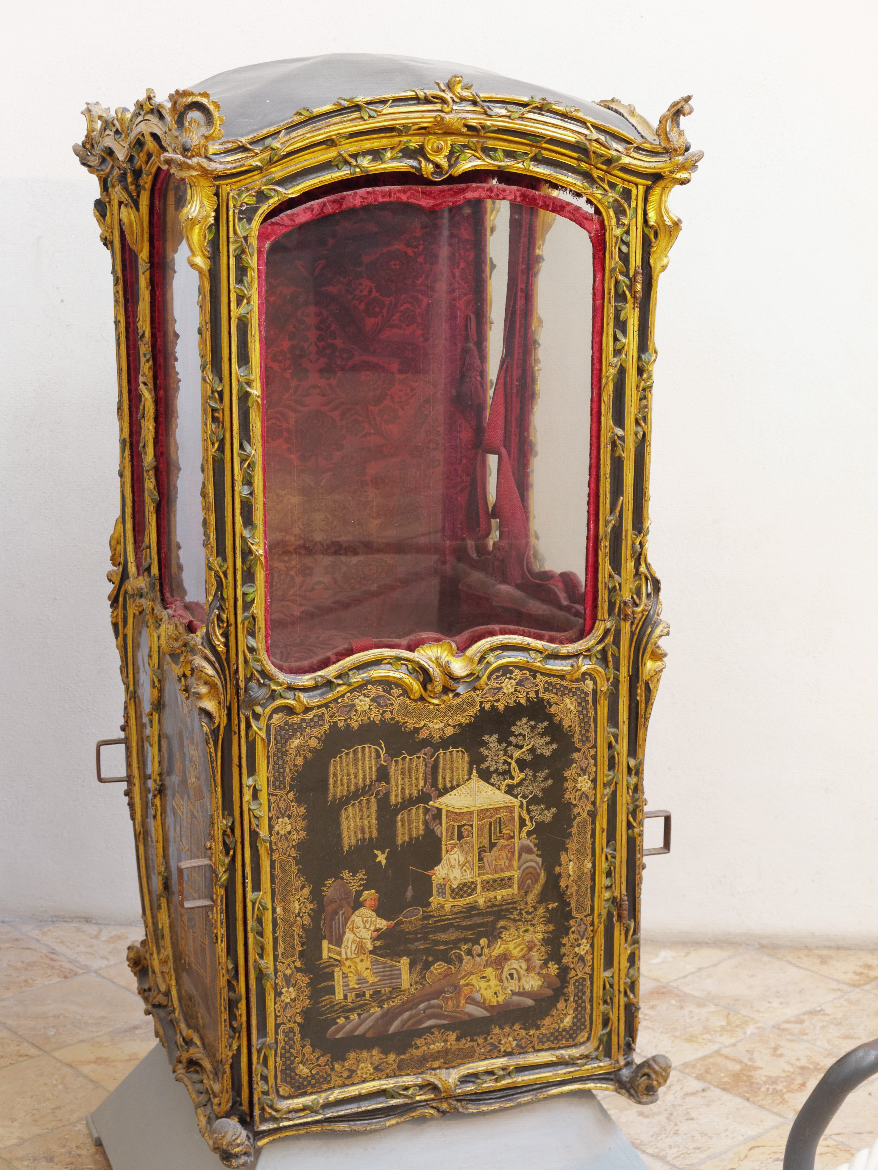 Sänfte im Diozösanmuseum am Dom von Amalfi Museo Diocesano di Amalfi, Kampanien, Italien